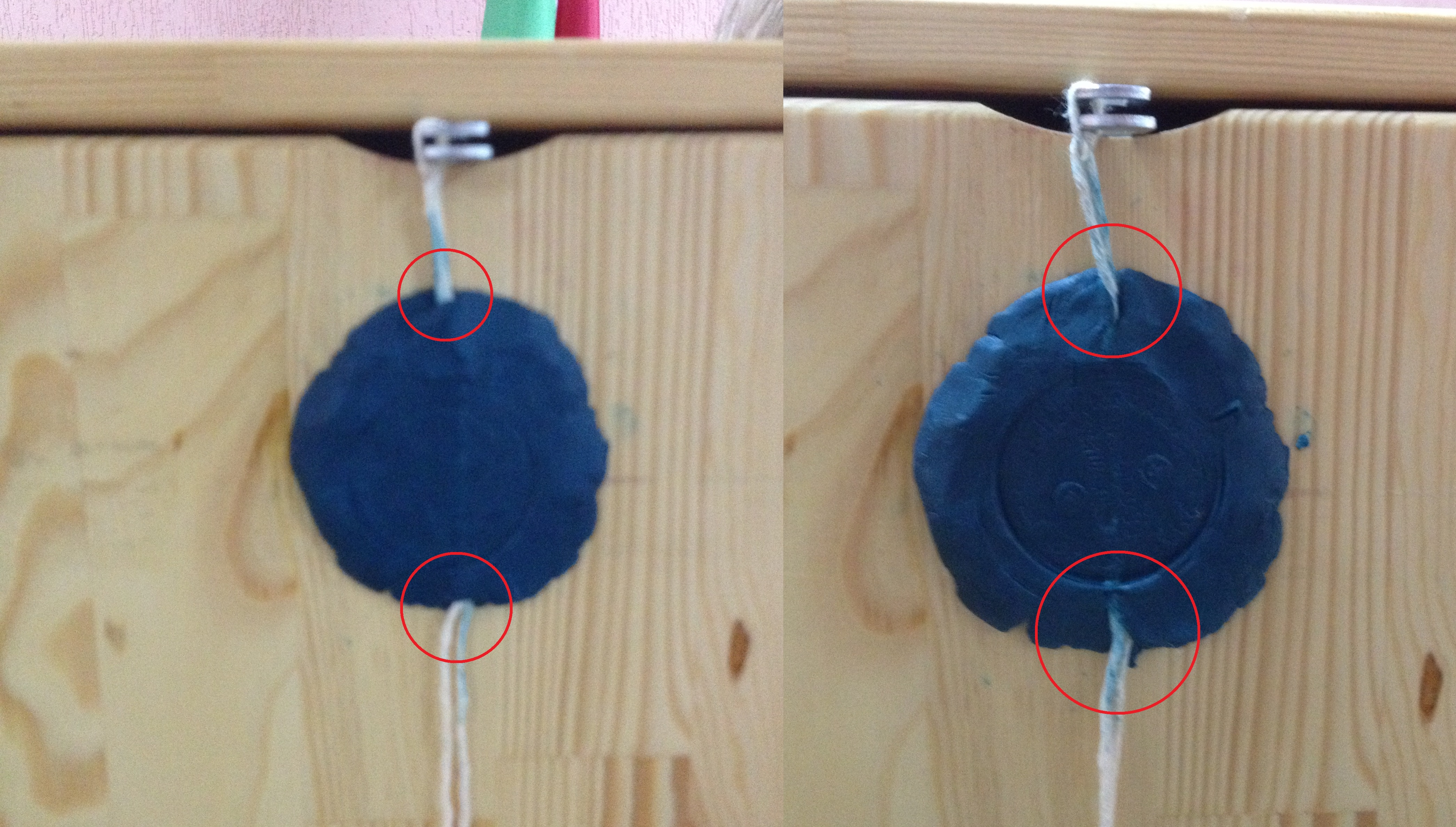 Pieczęć na urnie do przedterminowego głosowania - porównanie zdjęć wykonanych wieczorem dzień przed wyborami i rano następnego dnia. Widoczne są ślady prawdopodobnego otwierania urny.